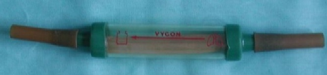 Fotografia di una valvola di Heimlich